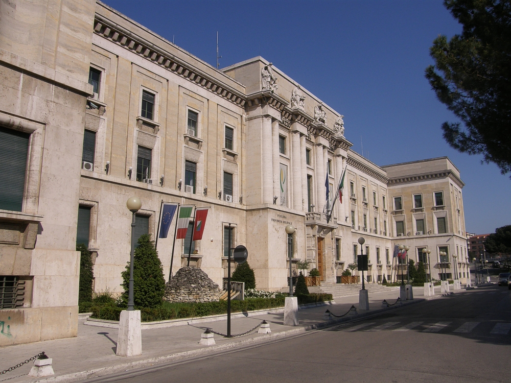 Gebäude des Provinsregierung Pescara